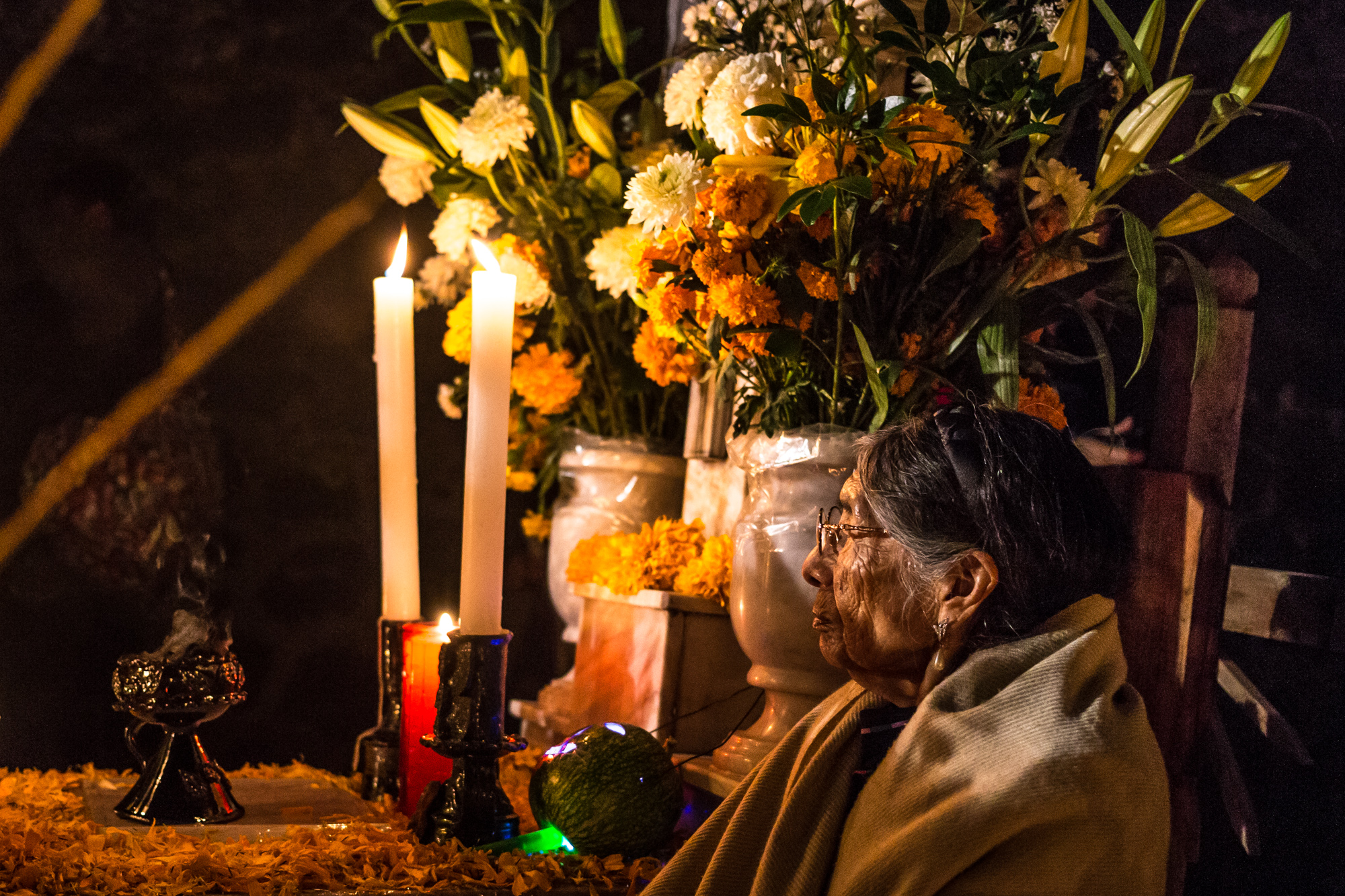 ¿Quién?: Habitantes del pueblo de Mixquic ¿Qué pasa?: Festival del Día de Muertos Lugar: Mixquic, Distrito Federal, México Tomada con Canon 6D y 24-105 f/4L